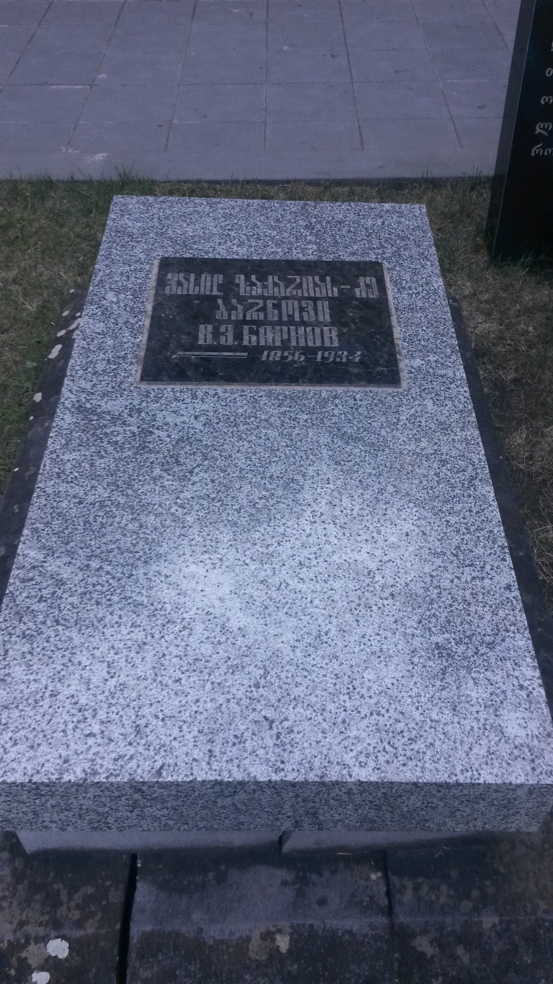 მთაწმინდის პანთეონი